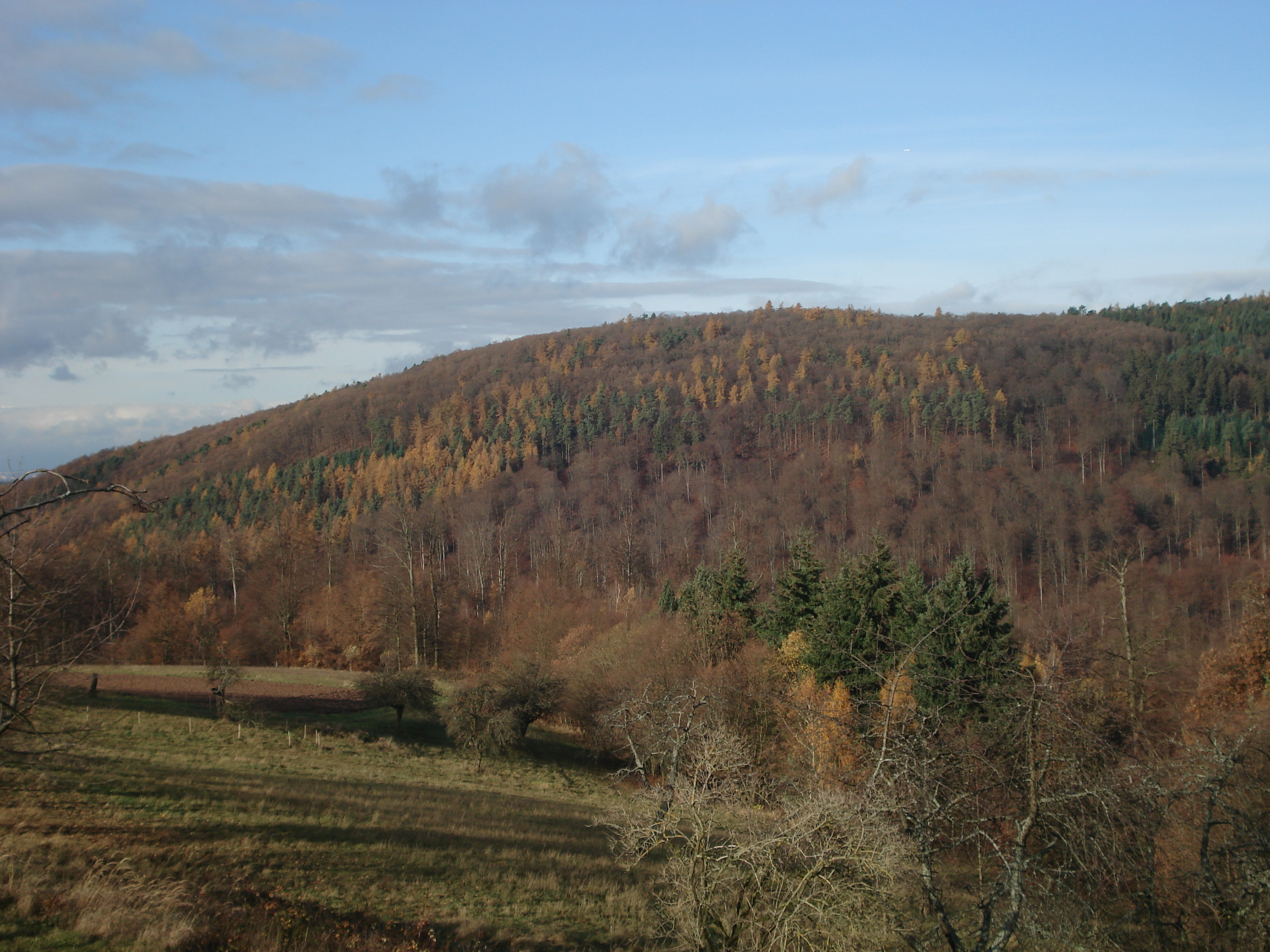 Der Gipfel des Schanzenkopfs zwischen Mömbris und Alzenau, vom Nachbarberg über den Teufelsgrund von Südosten gesehen